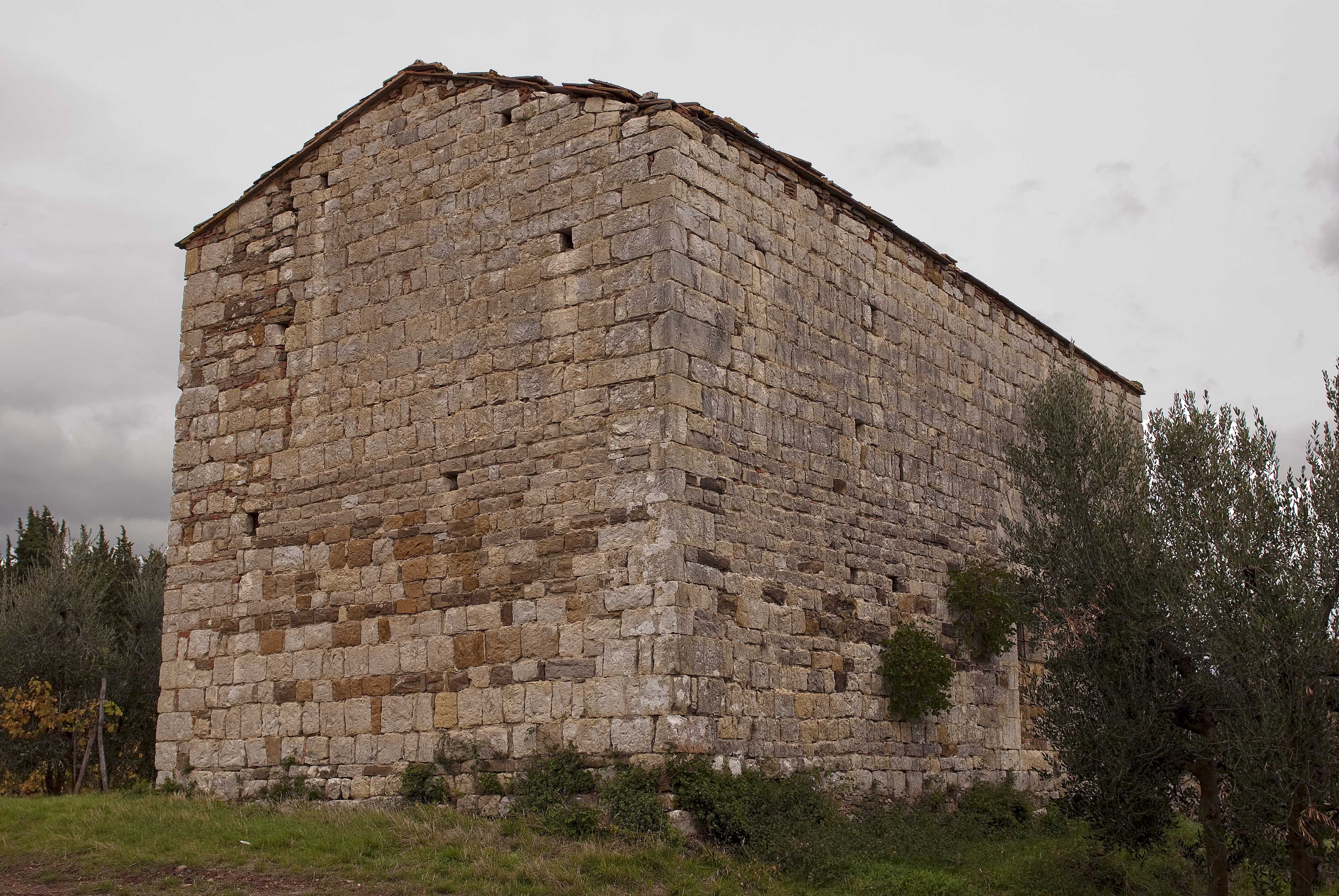 Abside della Chiesa di San Giorgio allo Spadaio - Barberino Val d'Elsa - Firenze